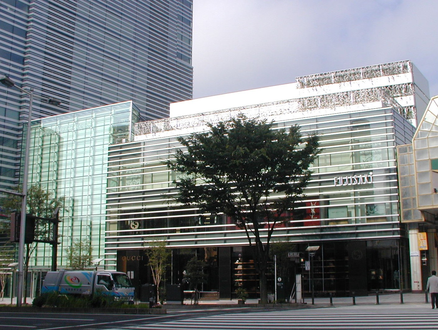 新伝馬町（中央通り）と東二番丁の交差点から見た仙台ファーストタワーのアトリウム（写真左）と商業棟（写真右）。商業棟には藤崎ファーストタワー館が入居している。